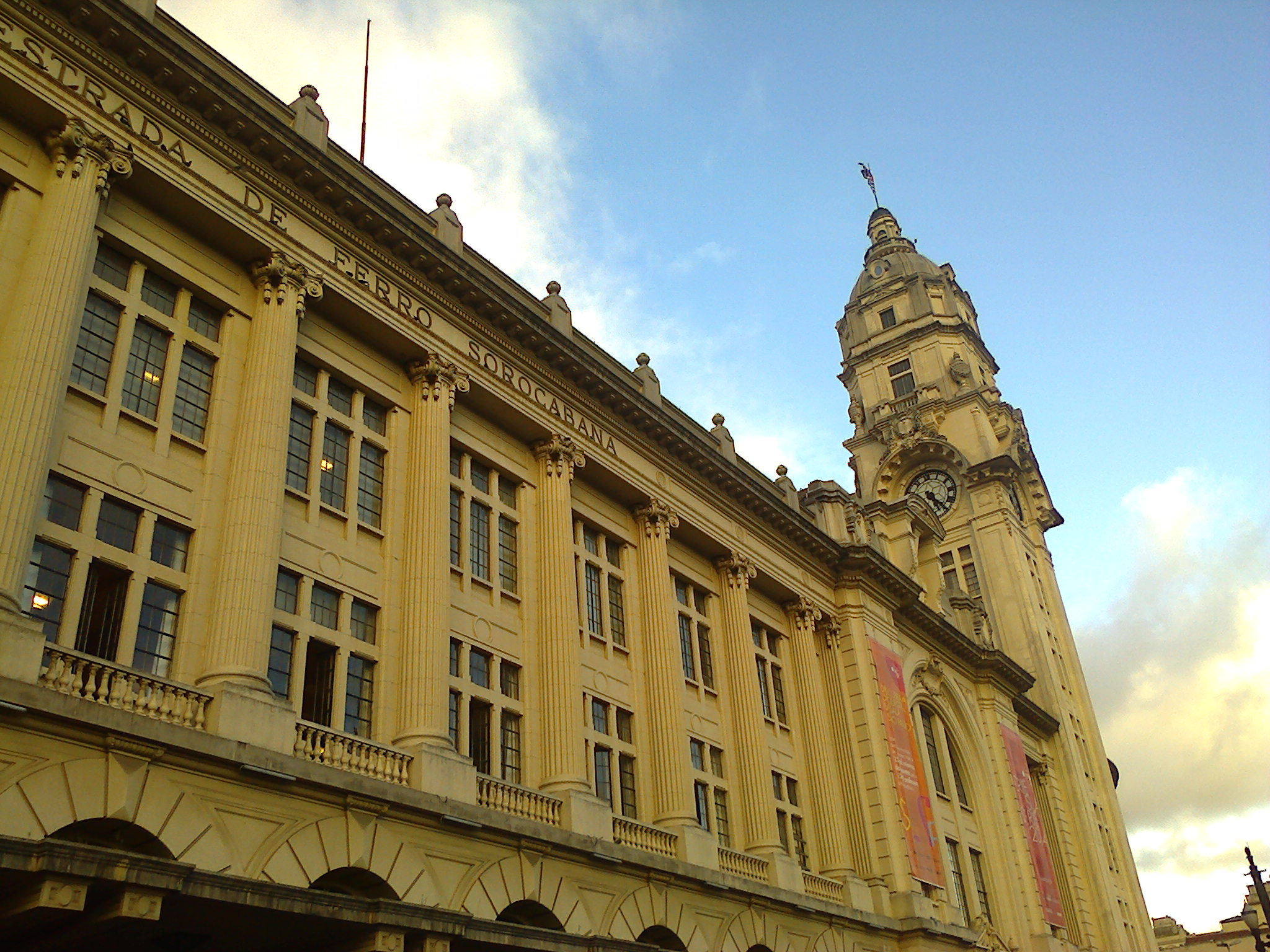 Clicada durante uma visita à sala da OSESP, em um fim de tarde ensolarado.